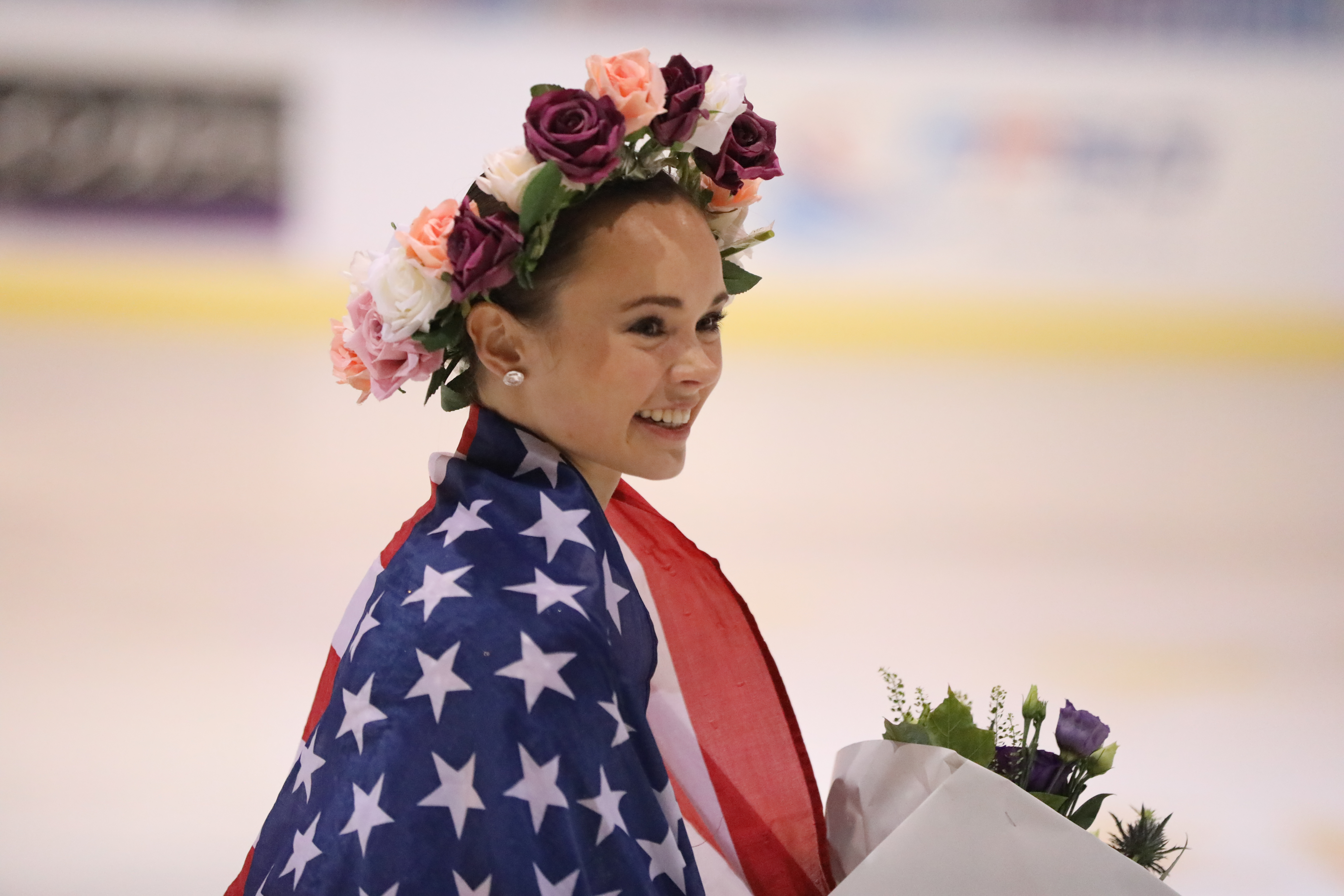 Internationaux de France 2019